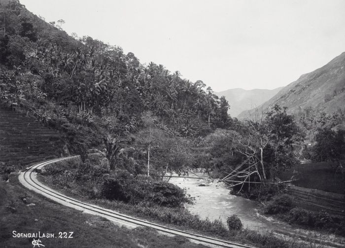 foto. Soengailasi bij Sawahloento in de Padangsche Bovenlanden (steenkolenmijn-gebied)